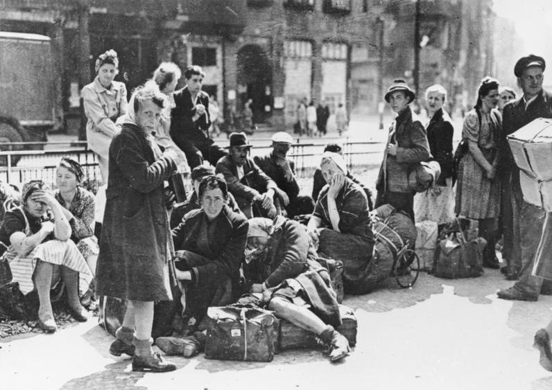 Flüchtlinge 1945 In Berlin warten diese Flüchtlinge auf ihren Abtransport.